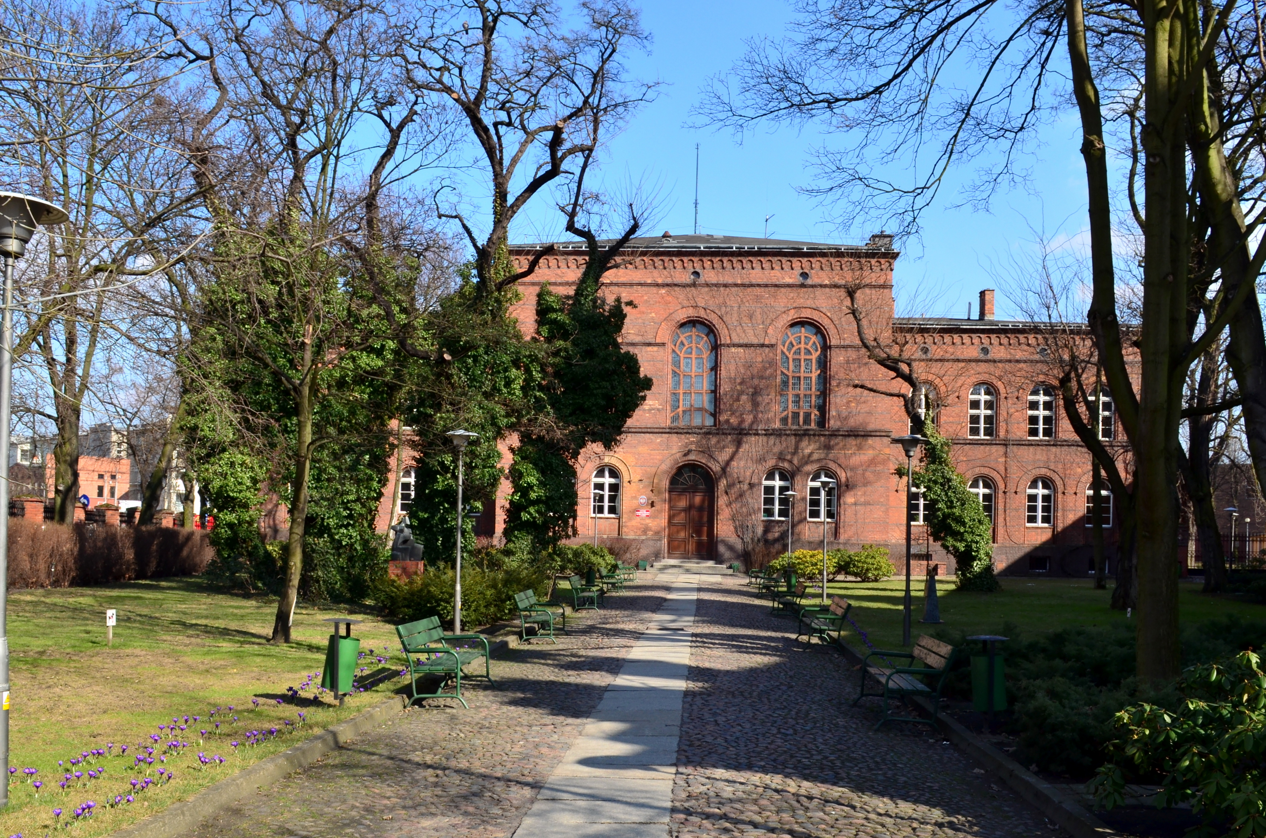 Poznań, gimnazjum Marii Magdaleny, 1855